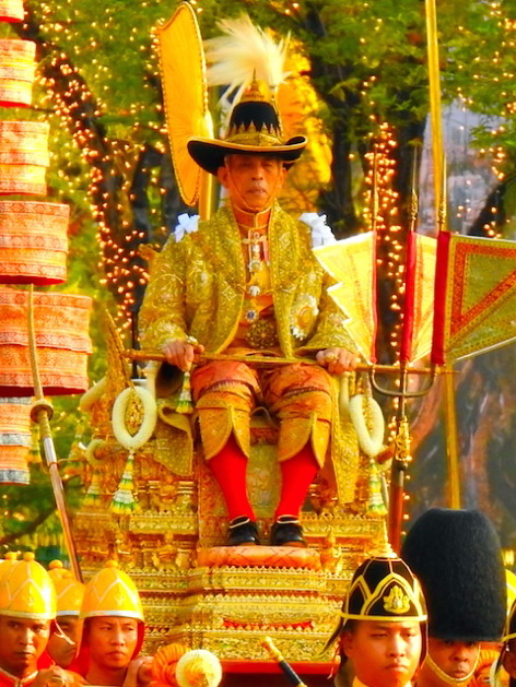 พระบาทสมเด็จพระปรเมนทรรามาธิบดีศรีสินทรมหาวชิราลงกรณ พระวชิรเกล้าเจ้าอยู่หัว ประทับบนพระราชยานพุดตานทอง ระหว่างการเคลื่อนกระบวนพยุหยาตราทางสถลมารค เสด็จพระราชดำเนินจากพระบรมมหาราชวังไปยังวัดบวรนิเวศวิหาร เพื่อทรงสักการะปูนียสถานและปูชนียวัตถุสำคัญต่างๆ เนื่องในการพระราชพิธีบรมราชาภิเษก เมื่อวันที่ 5 พฤษภาคม พ.ศ. 2562